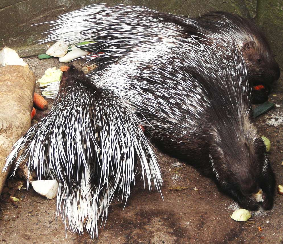 Hystrix leucura in ZOOM, Gelsenkirchen (Germany)